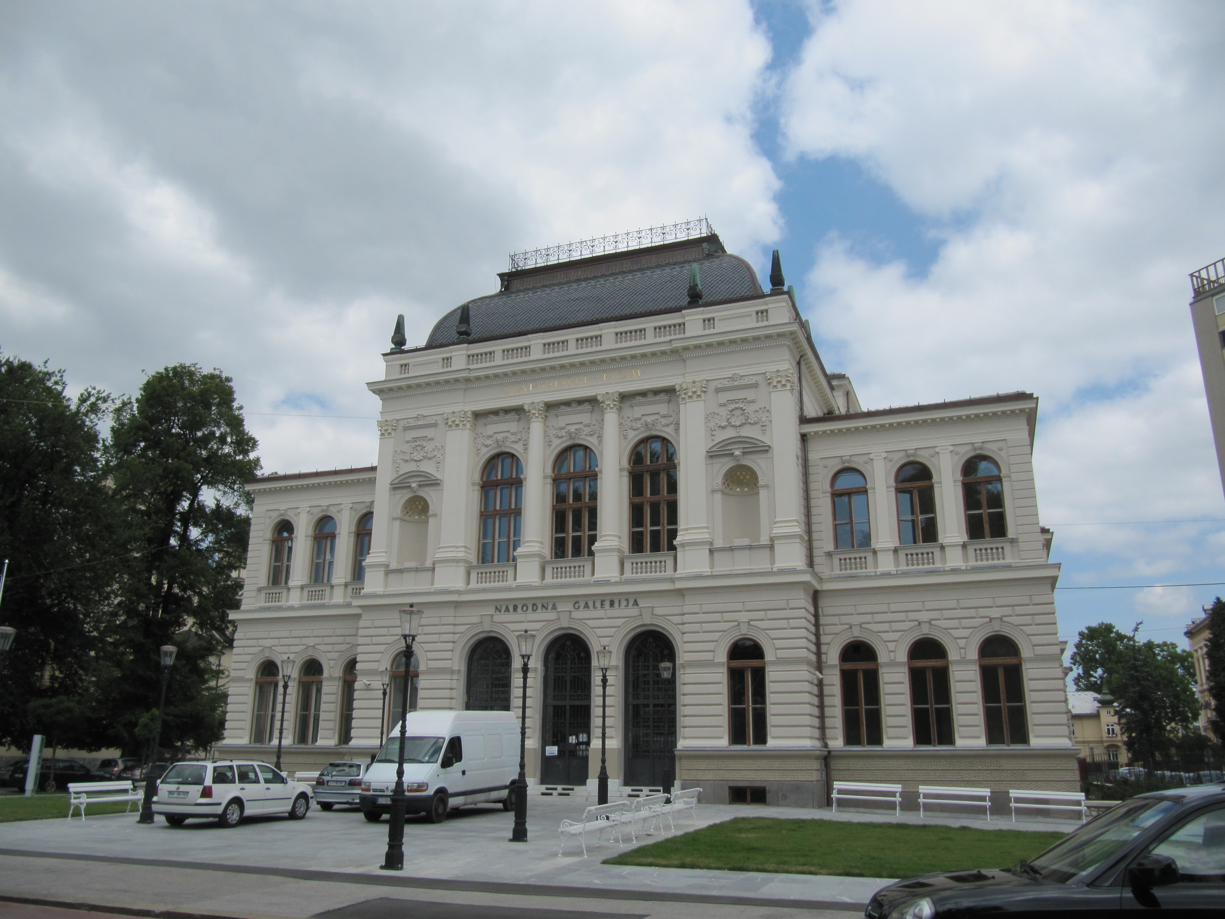 Narodna galerija